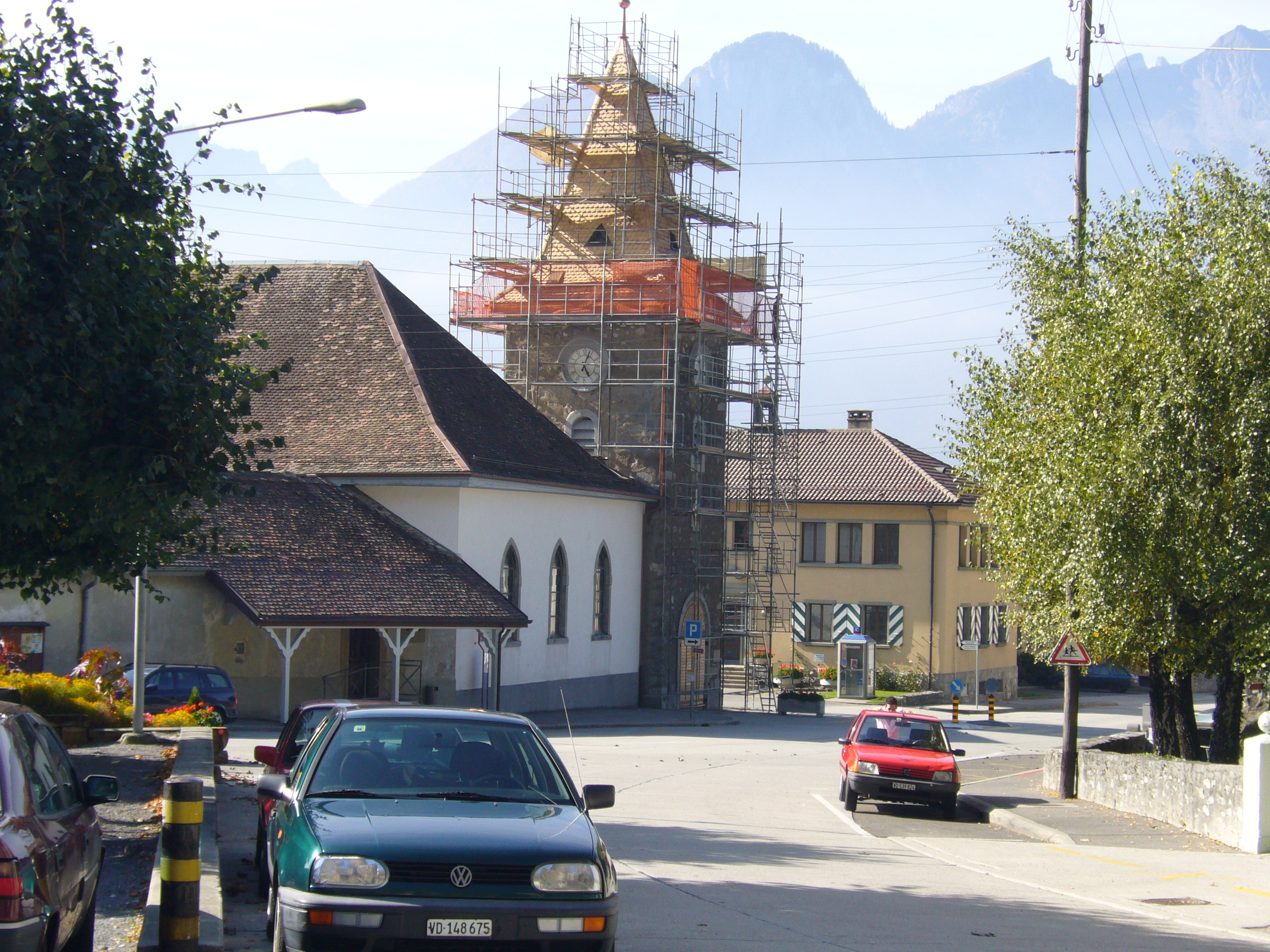 Kirche in Roche, Kanton Waadt